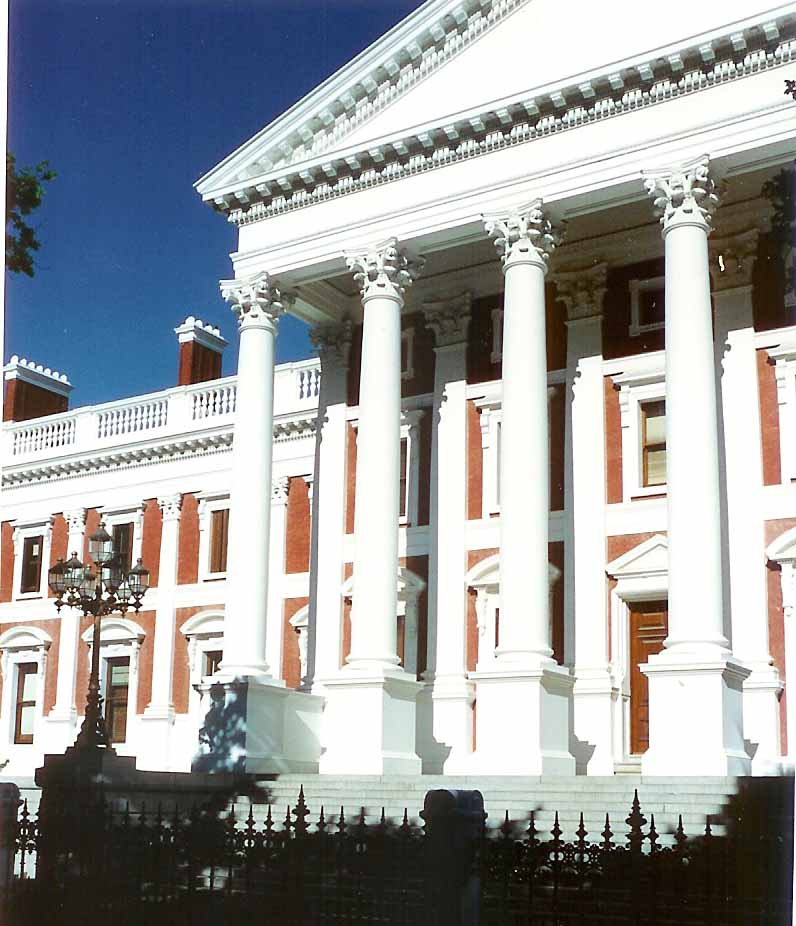 Sujet:Kapstad: d'Parlament Source: Eege Foto vum user ernmuhl Lizenz:GDFL